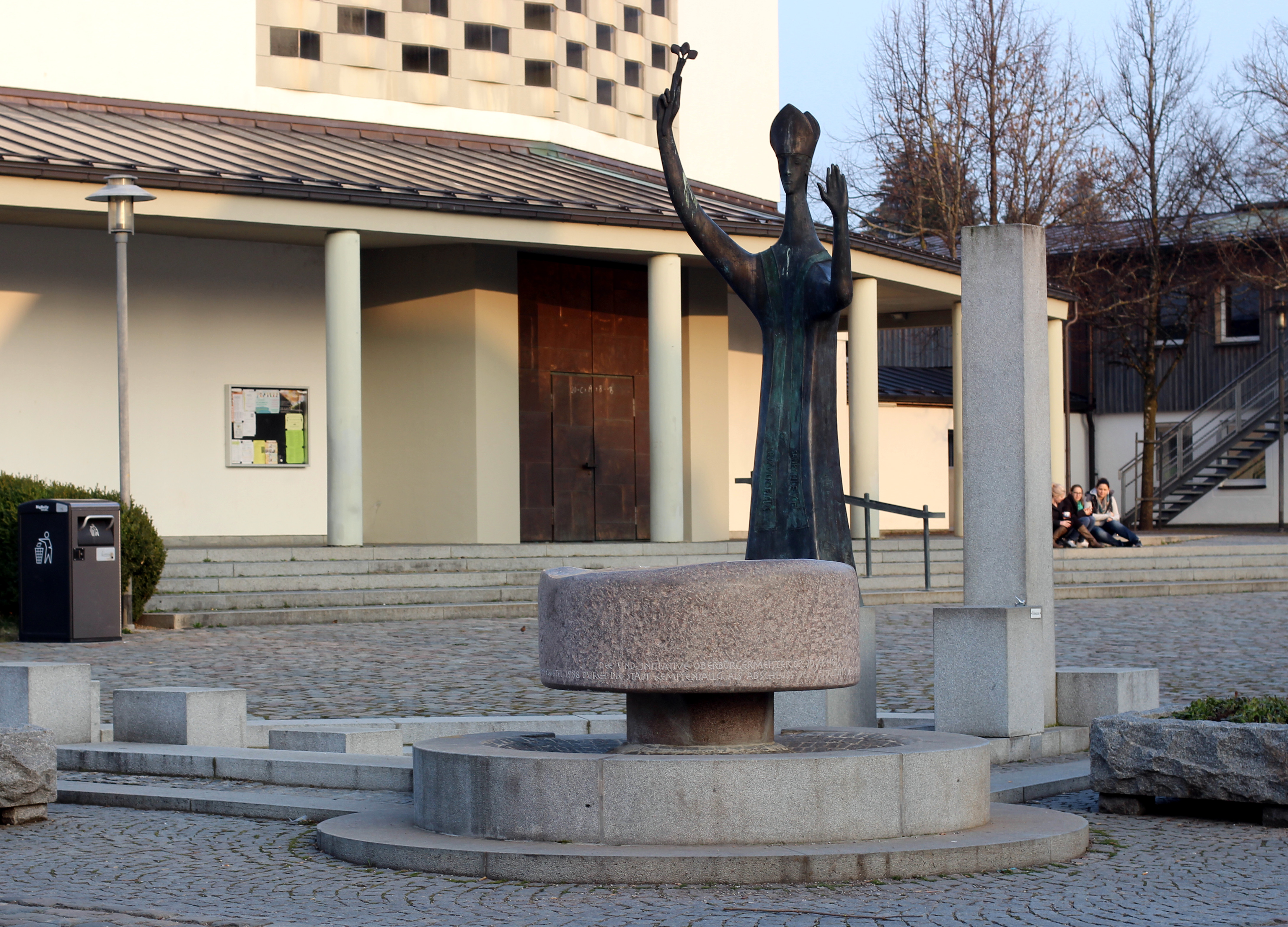 St.-Ulrichs-Brunnen bei der gleichnamigen Kirche in Kempten (Brunnen von Martin Wank)